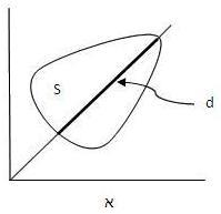 בתרשים 1 א נתונה בעיית מיקוח סימטרית (S,d). פתרון 𝛗 שמקיים את עקרון הסימטריה יימצא על גבי הקו השחור המודגש.